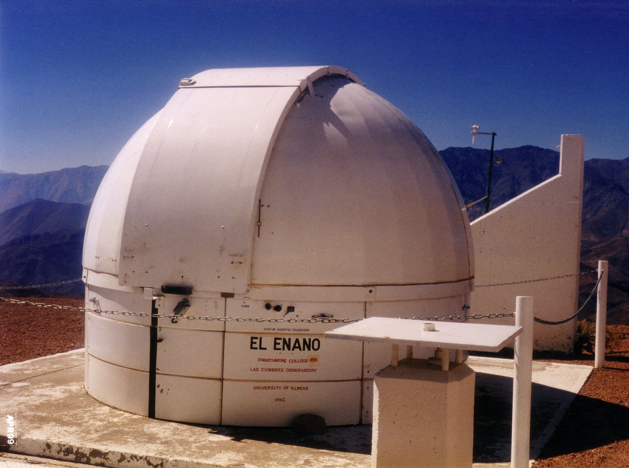 “El Enano” robotic telescope, Las Cumbres Observatory.